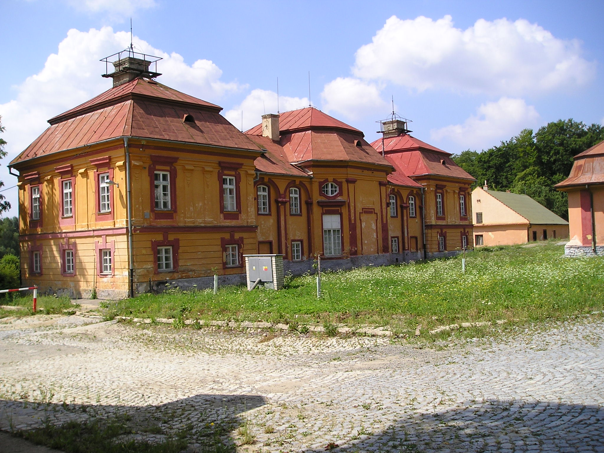 Zámek Ferdinandsko